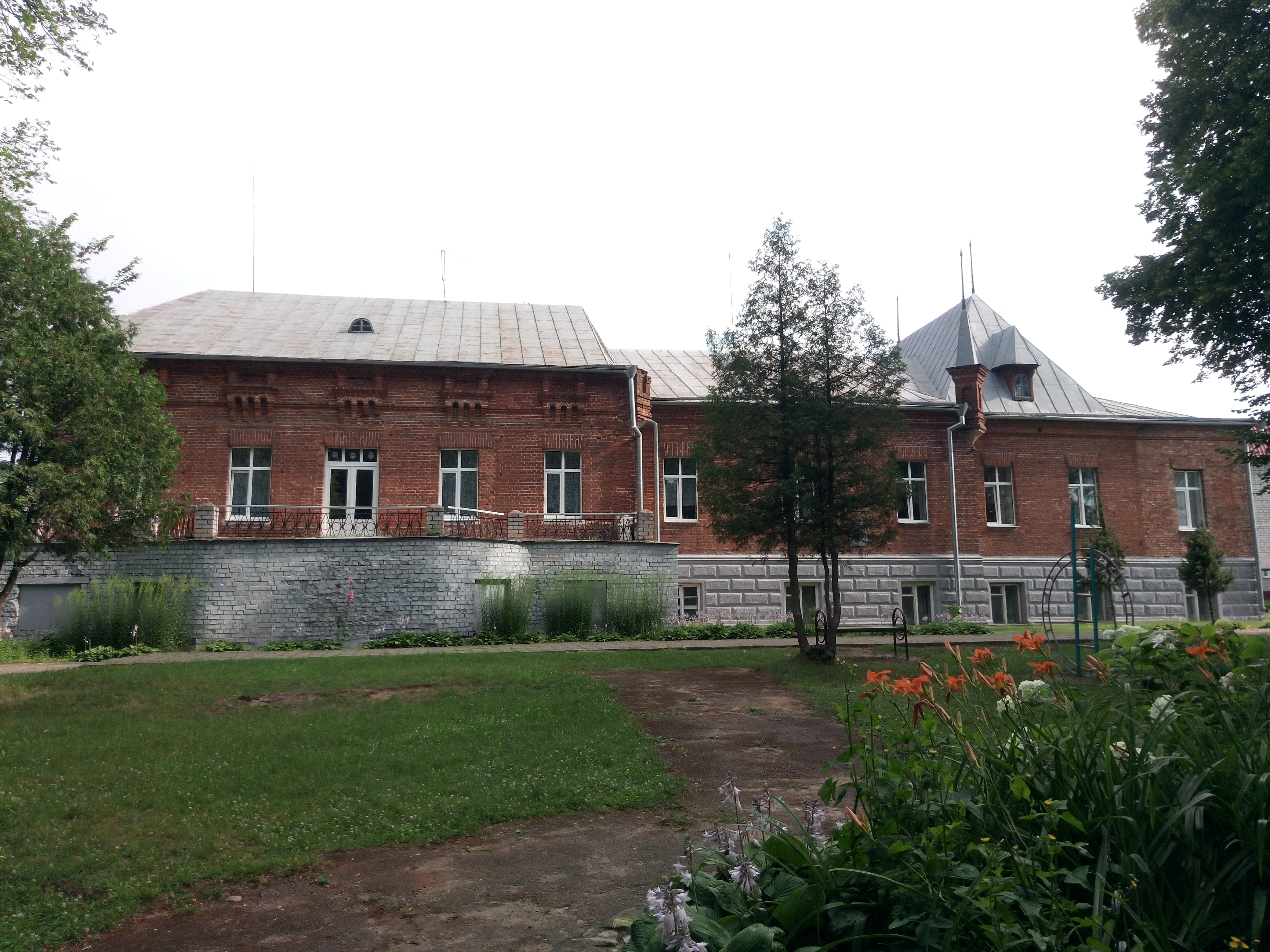 Сядзіба Макавых